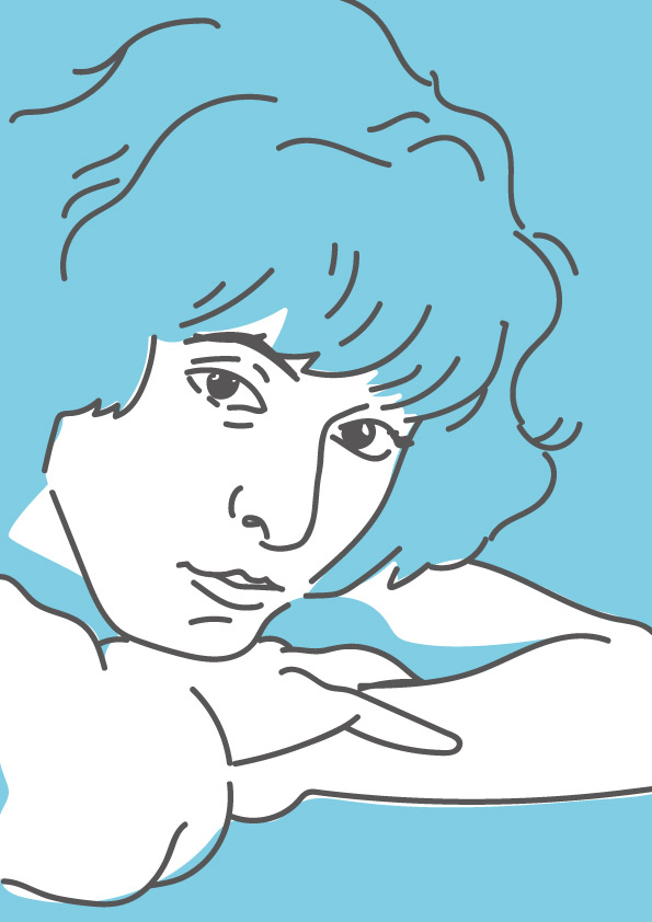 Ilustración de Xela Arias